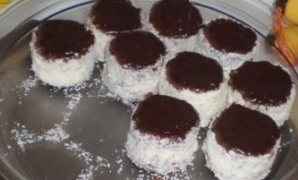 Ruske kape